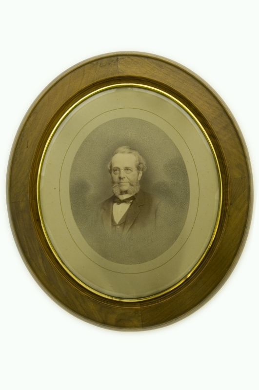 MuuseumikoguFotodOlemusfotoOriginaaloriginaalKollektsioonEestimaa Kirjanduse Ühingu muuseumi (Provintsiaalmuuseumi) koguSäilivushea legend Riigistatud Eestimaa Kirjanduse Ühingu Muuseumi varadest. kommentaar raamitud foto füüsiline kirjeldus Ovaalne puitraam, katteklaasiga. Foto lõigatud ovaalseks, kleebitud aluspaspartuule. Fotol retušš..